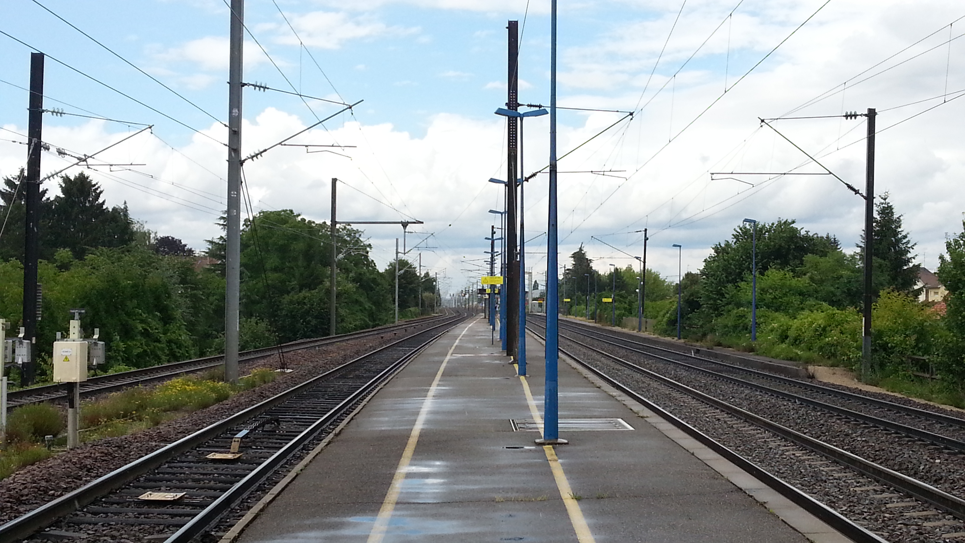 Les quais de la Gare de Mundolsheim, le 29 juin 2014.